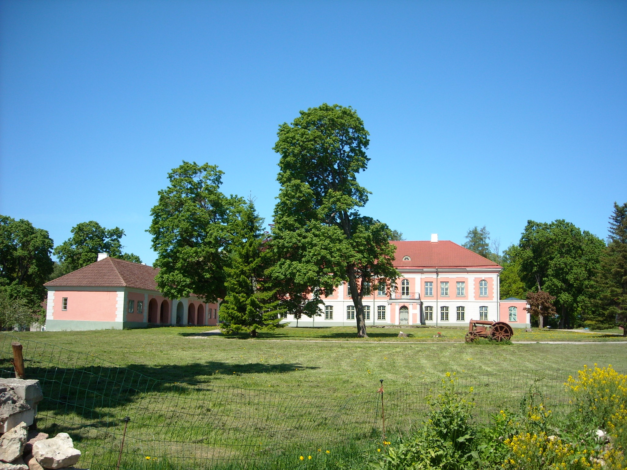 Rägavere mõis Lääne-Virumaal